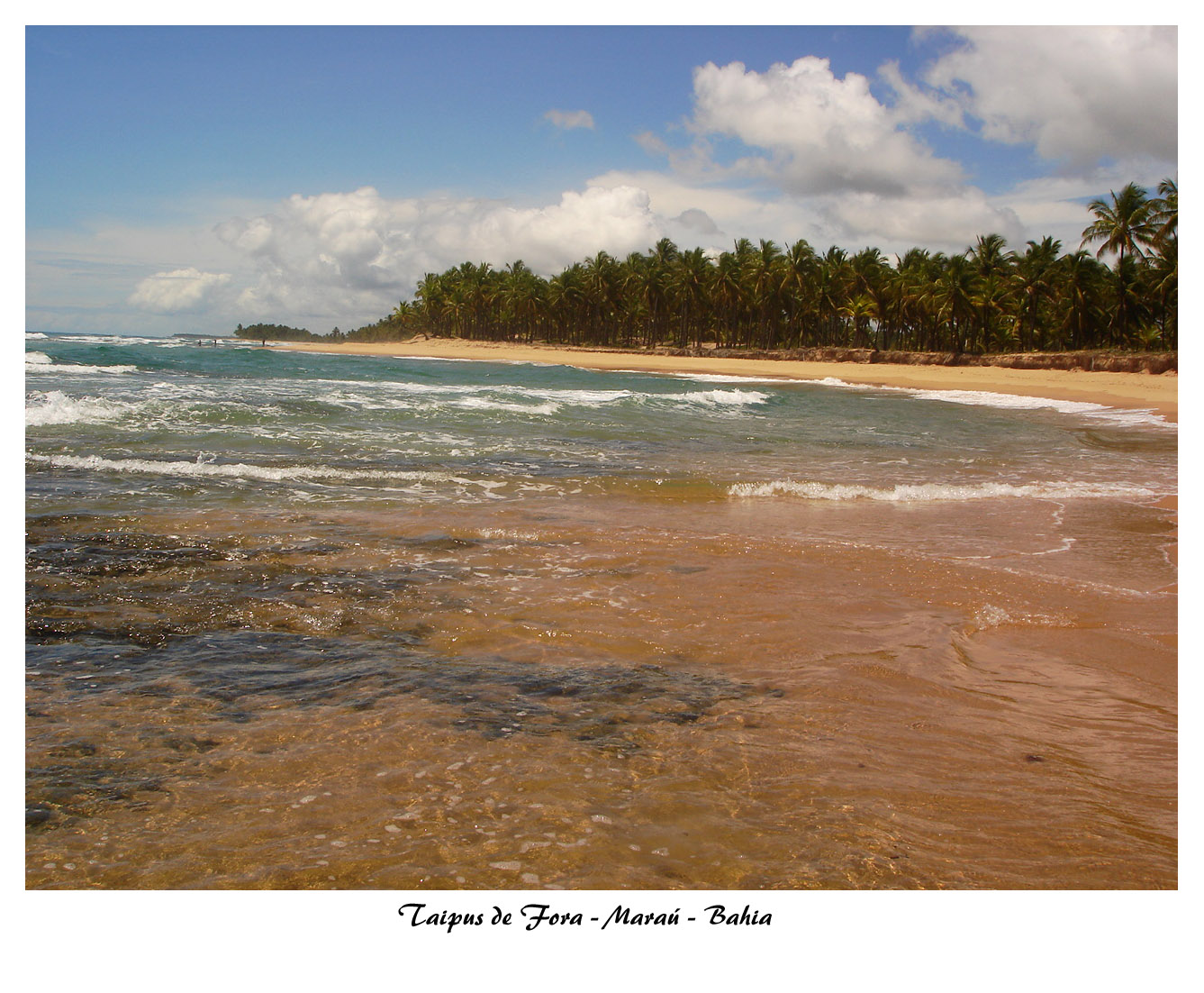 Praia de Taipus de Fora, Maraú, Bahia